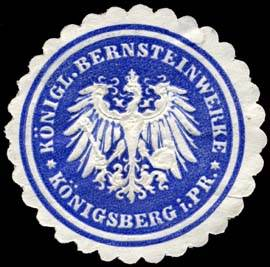 Sealing stamp Title: Königliche Bernsteinwerke - Königsberg in Preussen Description: blau, weiß, geprägt Place: Königsberg / Preussen size: 4 cm